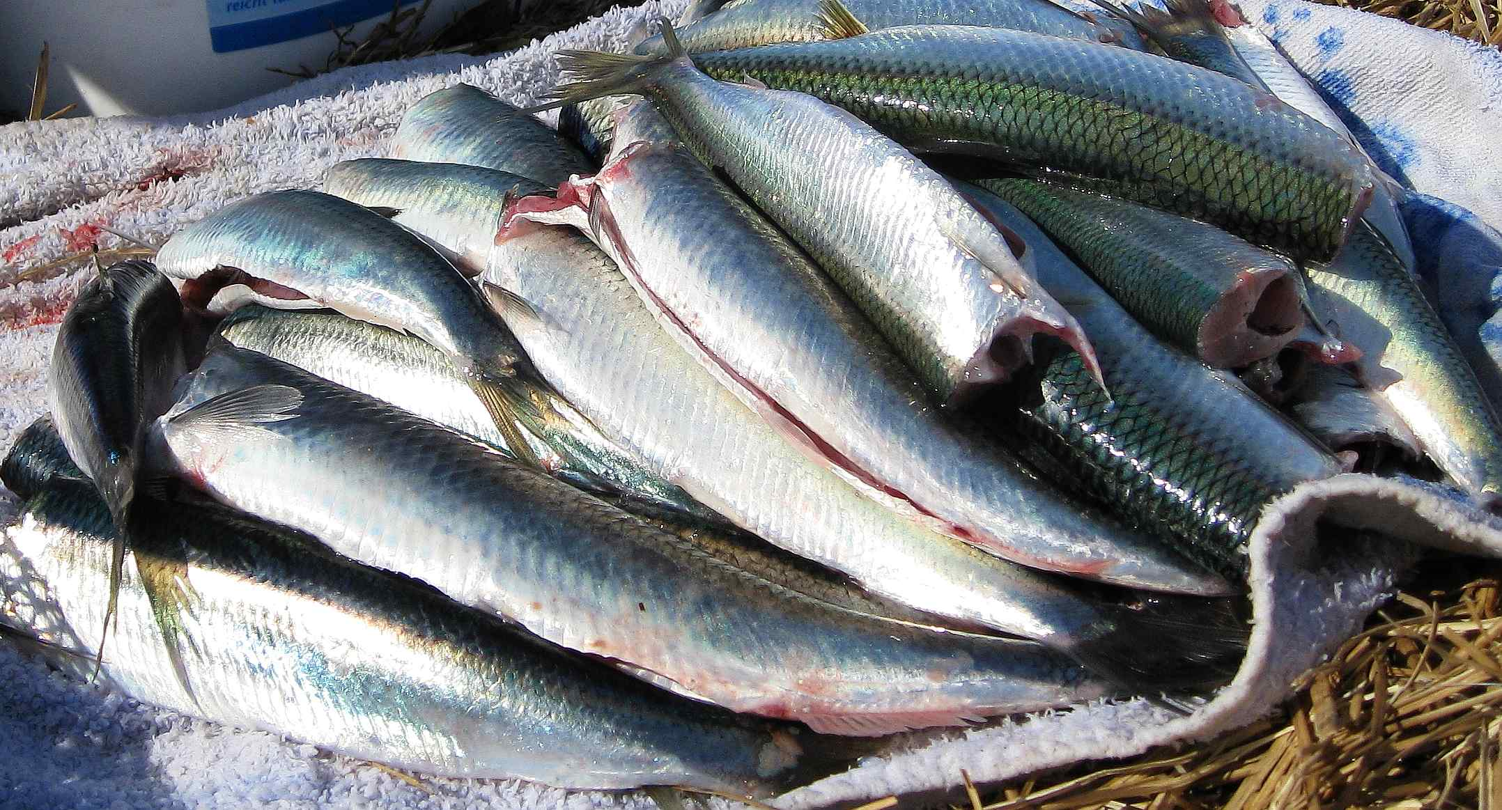 Sild fra voer